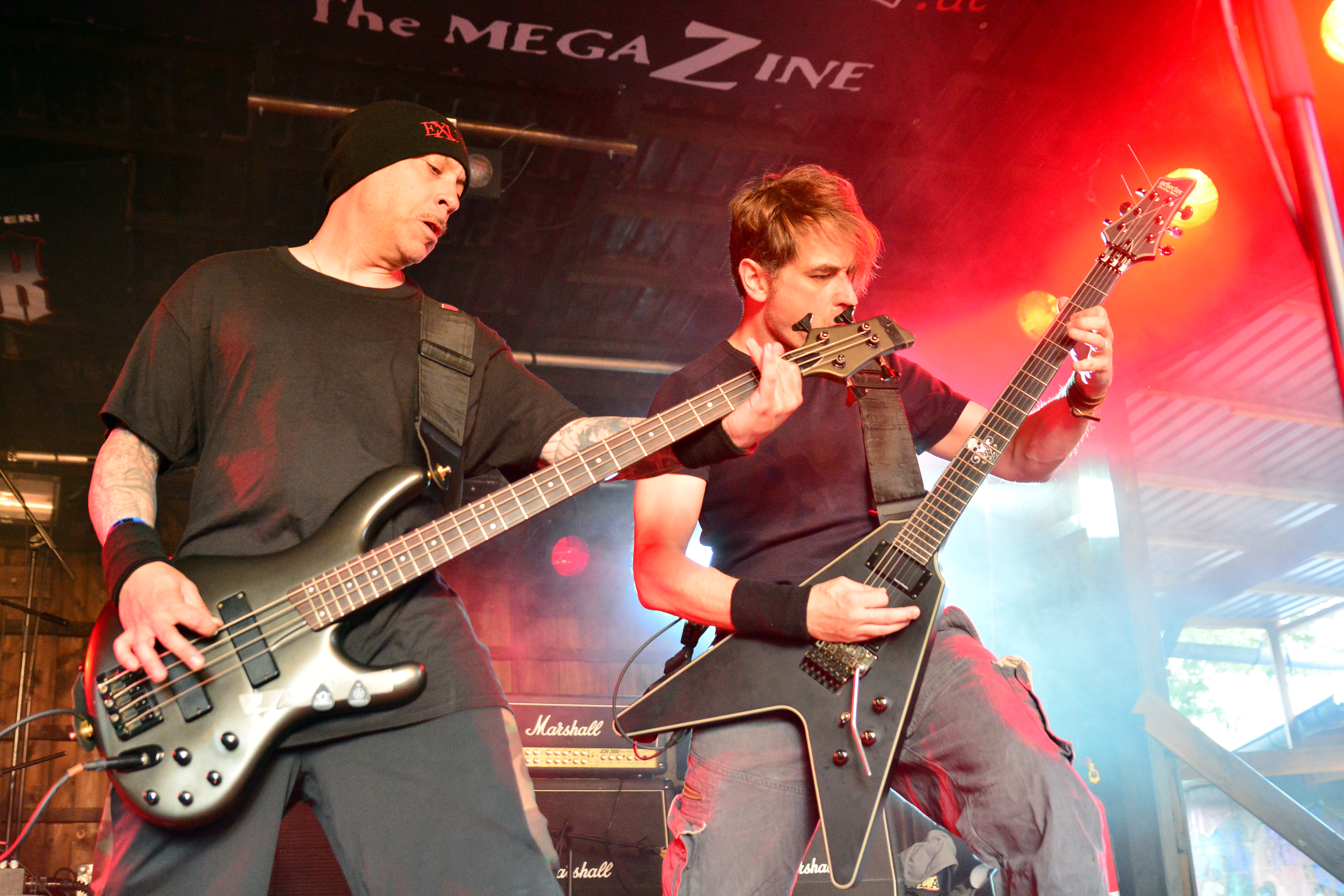 Exumer beim Headbangers Open Air 2015